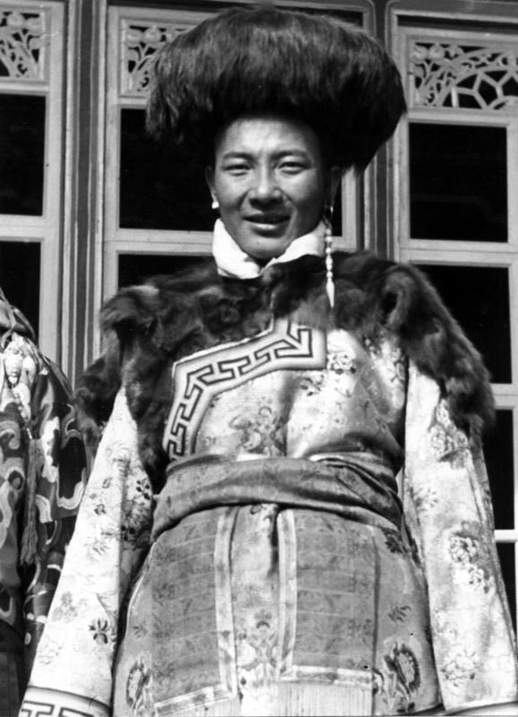 Lhasa, der Sohn des Kabinettministers im Staatsornat